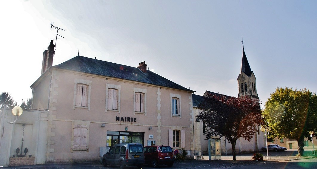 La Mairie et L'église